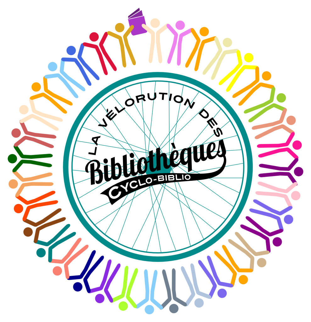 Logo Vélorution